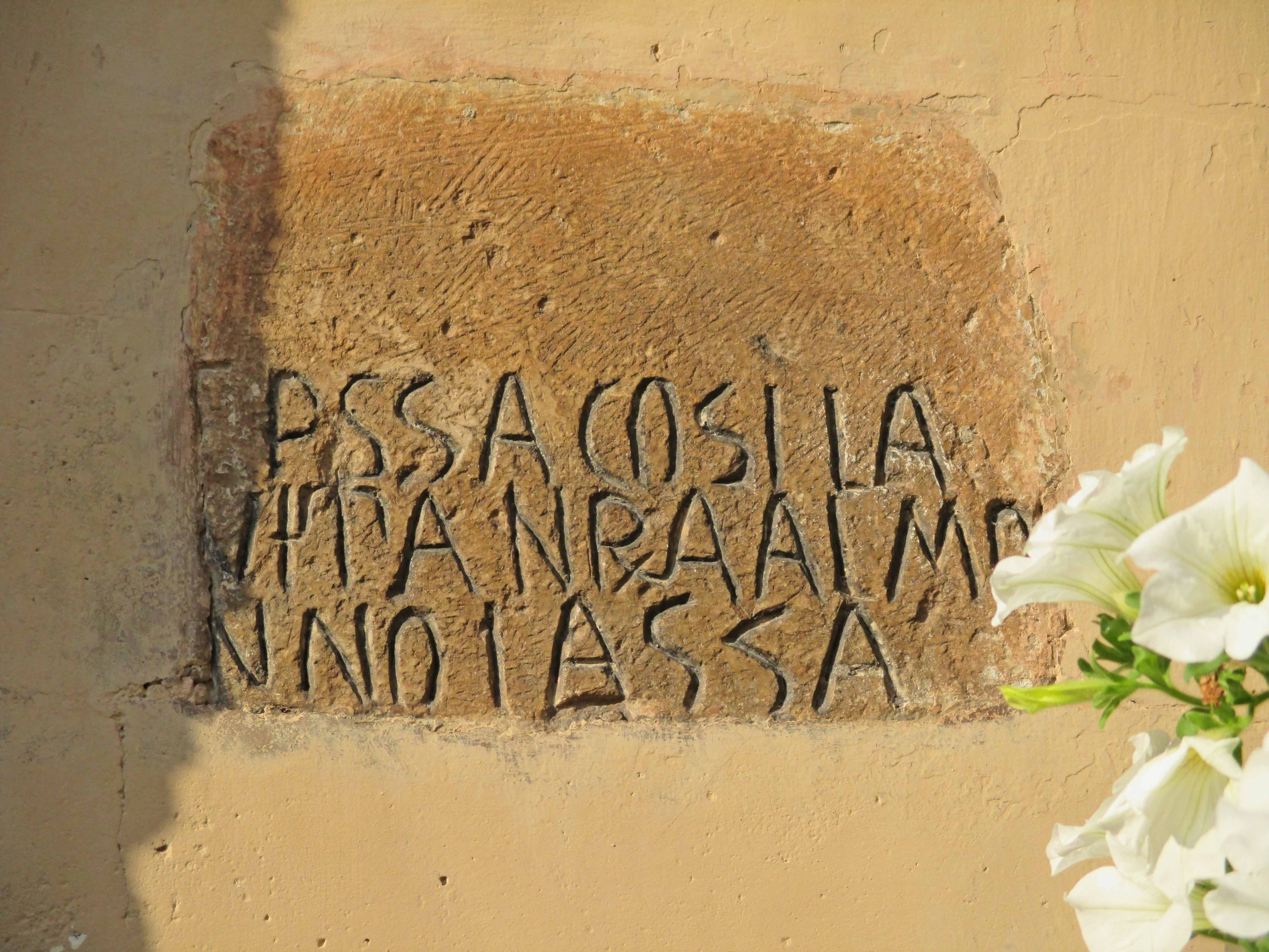 targa in dialetto di Scanno